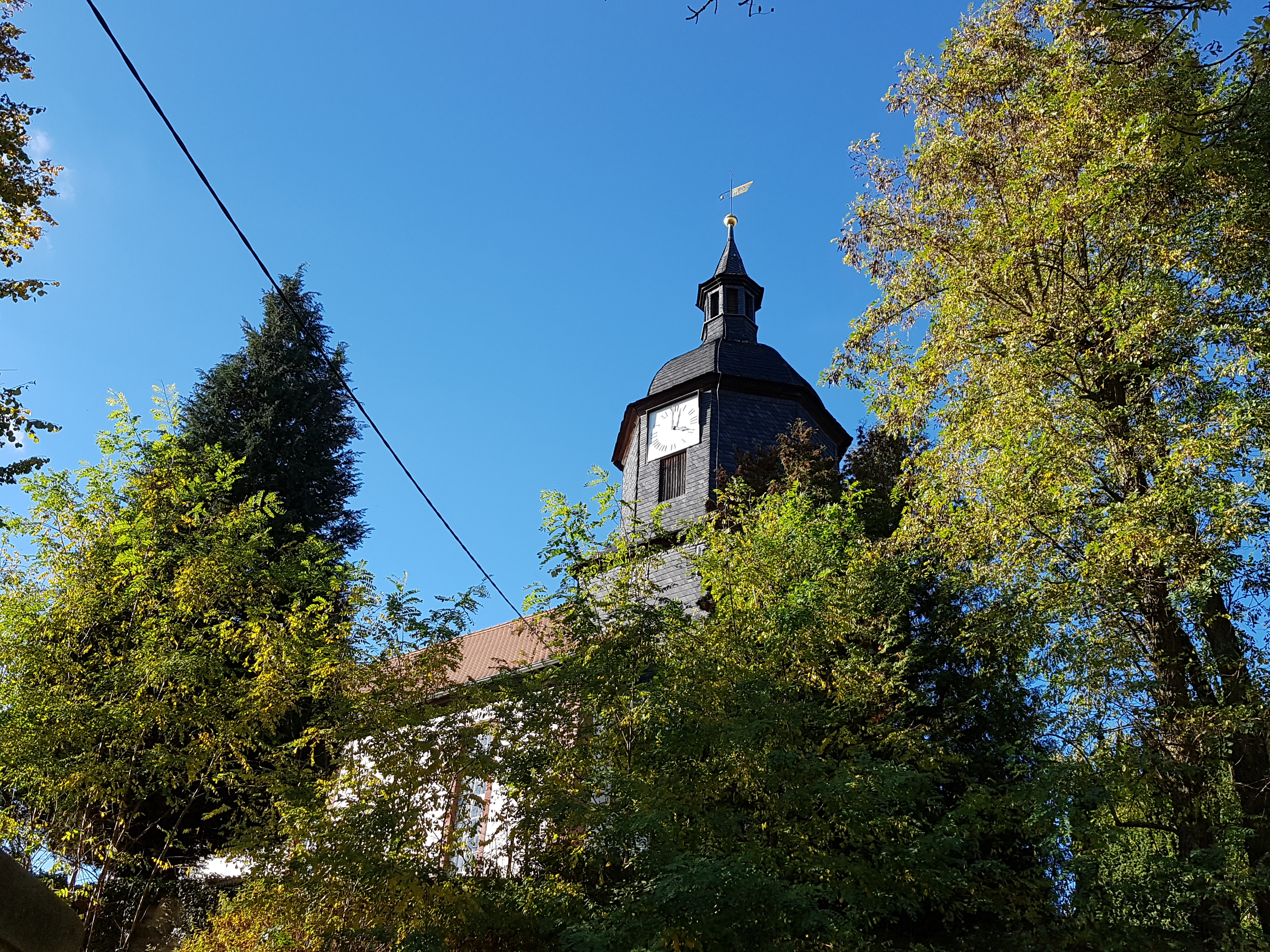 Dorfkirche von Lindenkreuz im Kreis Greiz (Thüringen)